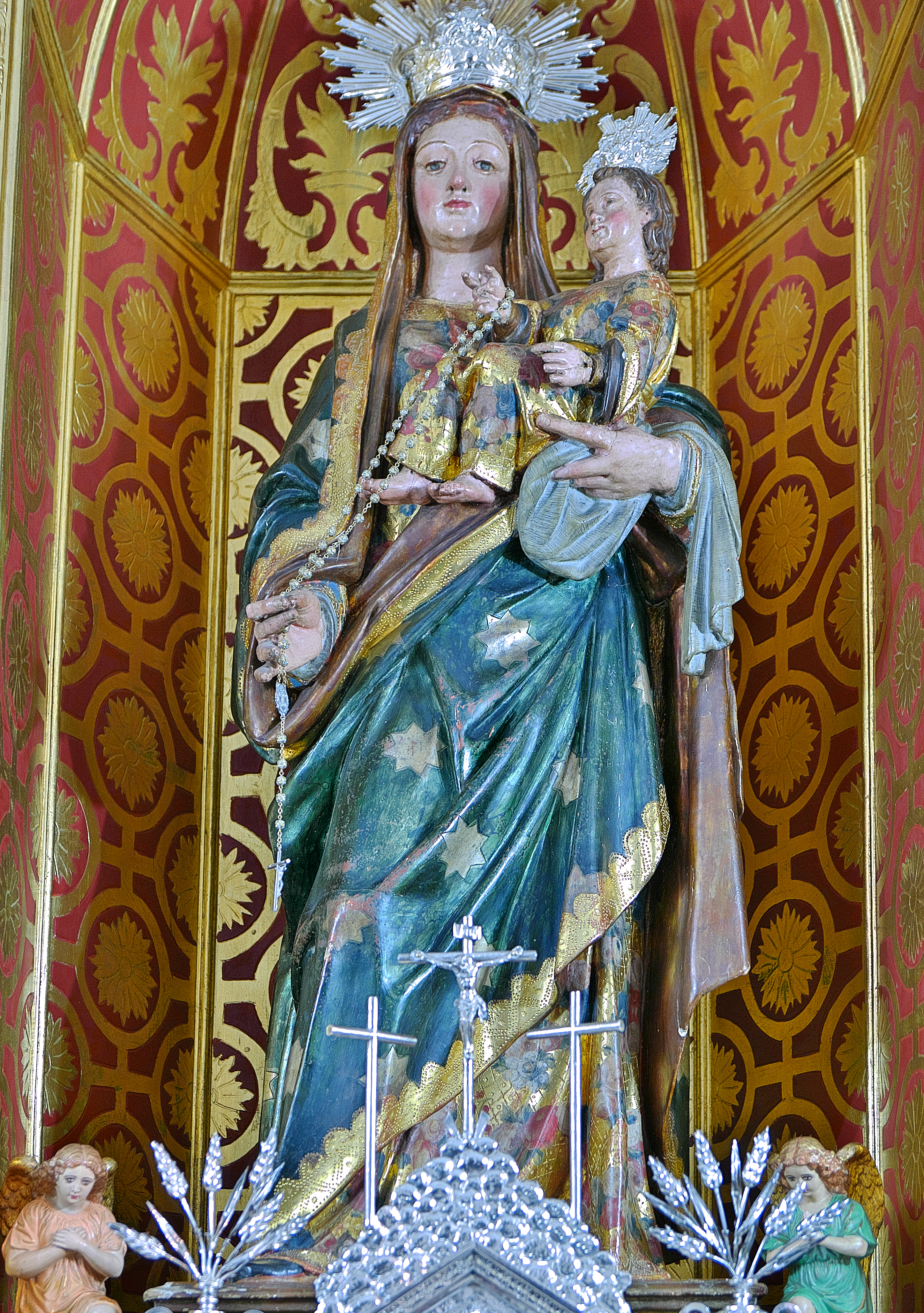 Iglesia de Nuestra Señora de la Estrella, Palomares del Río. Imagen de Nuestra Señora del Rosario, Miguel Adán (1588). La policromía actual es del siglo XVIII.